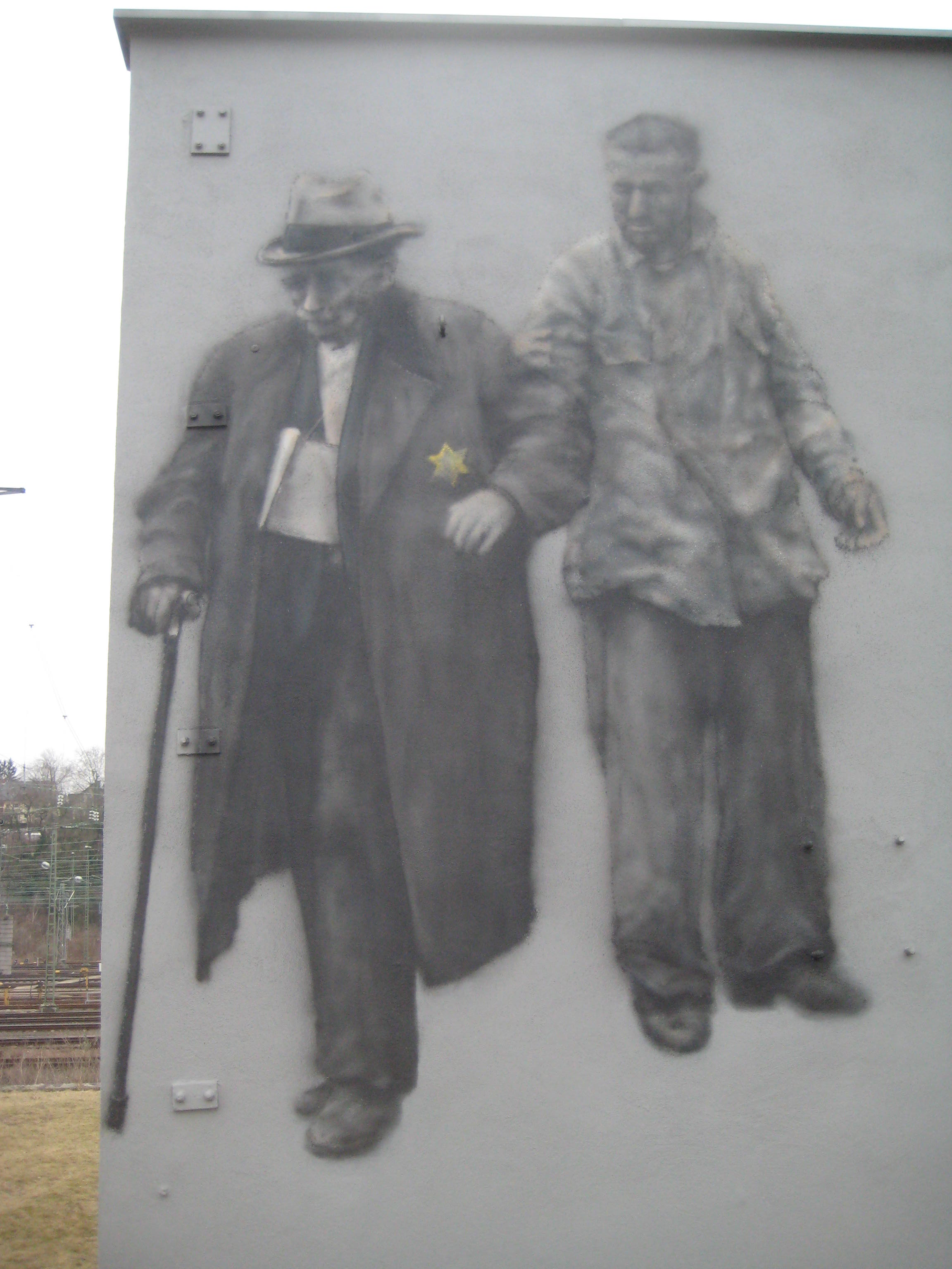 Westwand des Deportationsmahnmals Schlachthoframpe